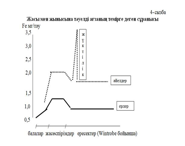 Жасы мен жынысына тәуелді ағзаның темірге деген сұранысы